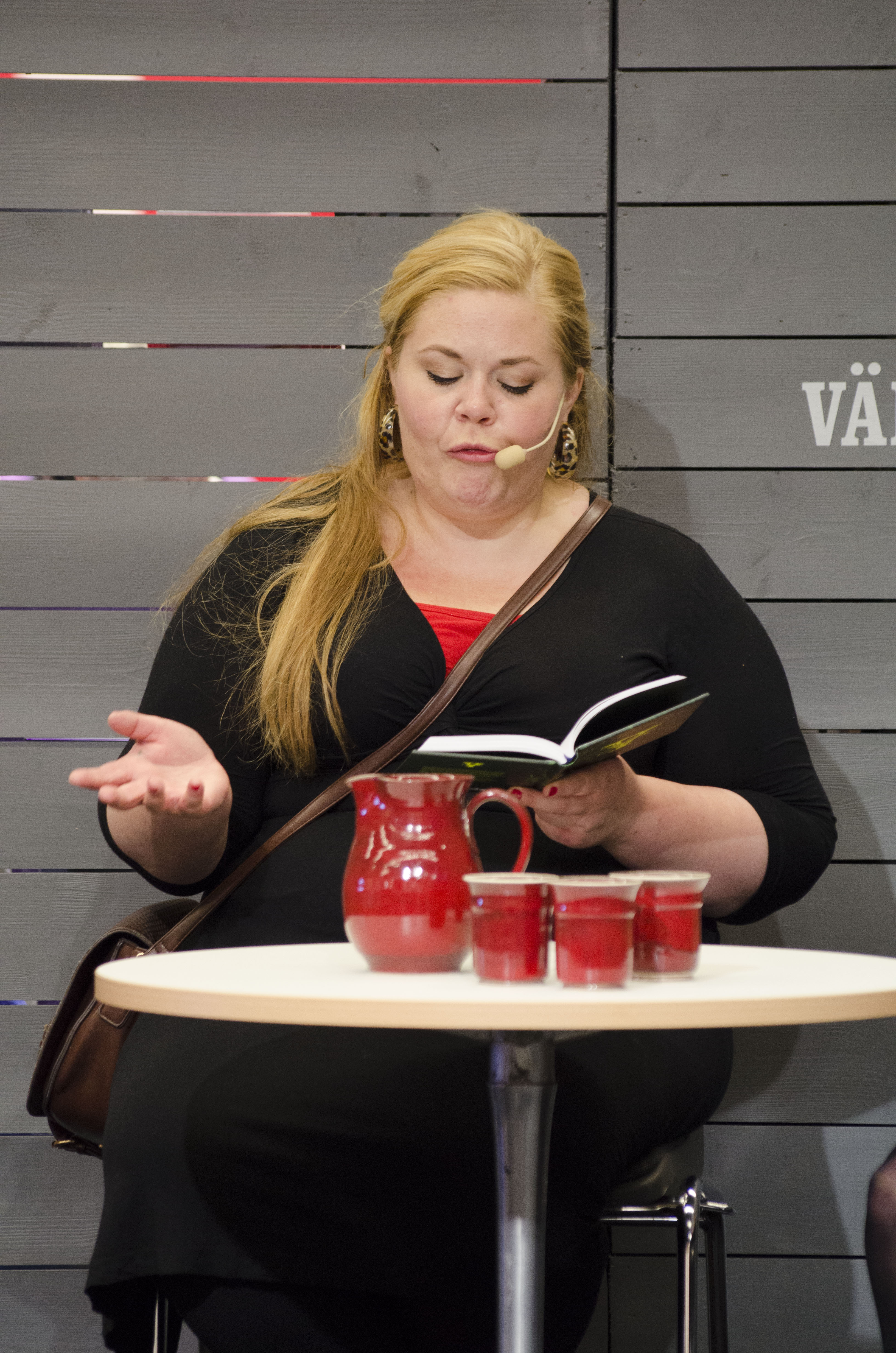 Malin Biller Göteborgs Bokmässa 2016.